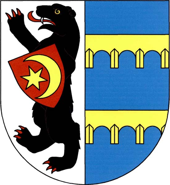 Znak obce Dobroměřice